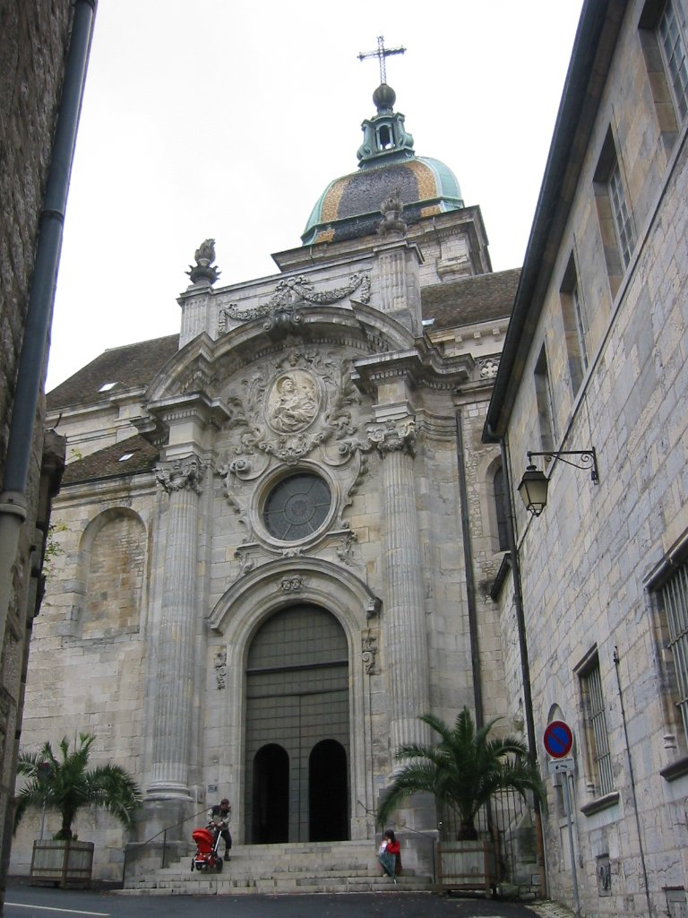 Eglise Saint Jean de Besançon